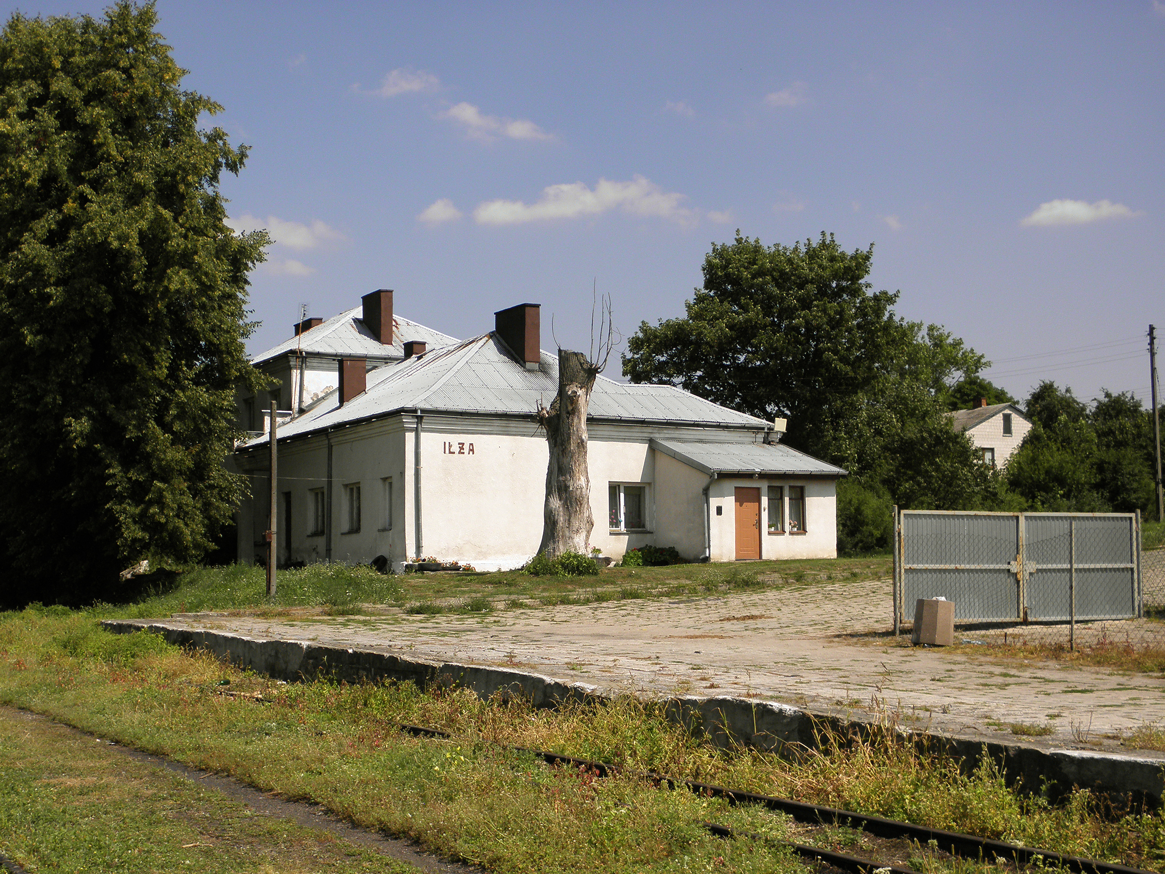 Iła - stacja nieistniejącej Starachowickiej Kolei dojazdowej.